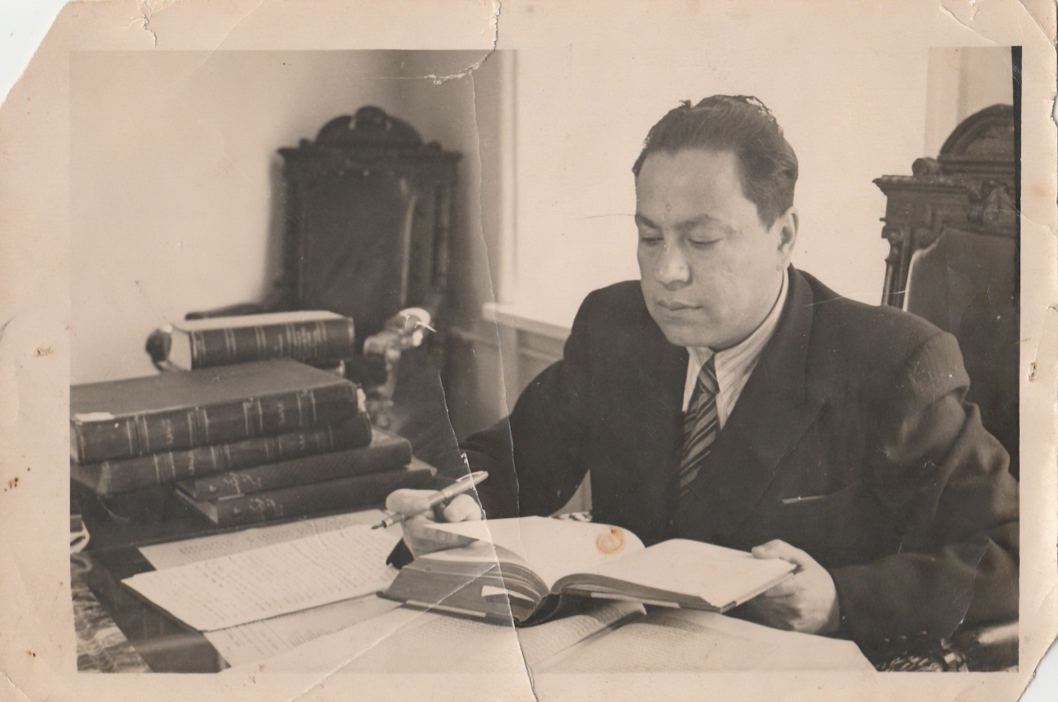 Oʻzbekcha/ўзбекча: Bogoutdinov A.M - 1963 yil